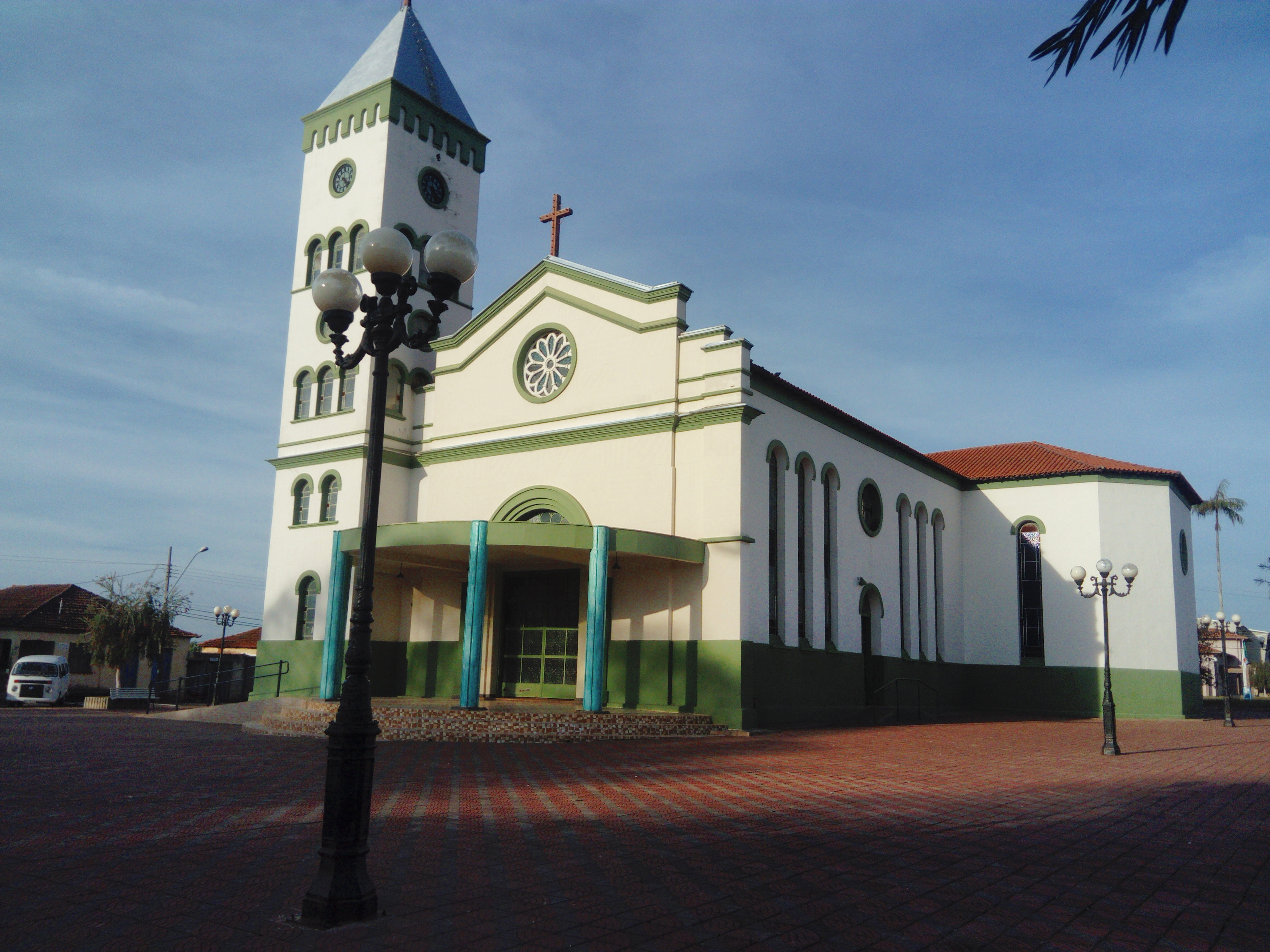 Igreja Matriz de Nossa Senhora da Conceição em Divisa Nova, Minas Gerais.